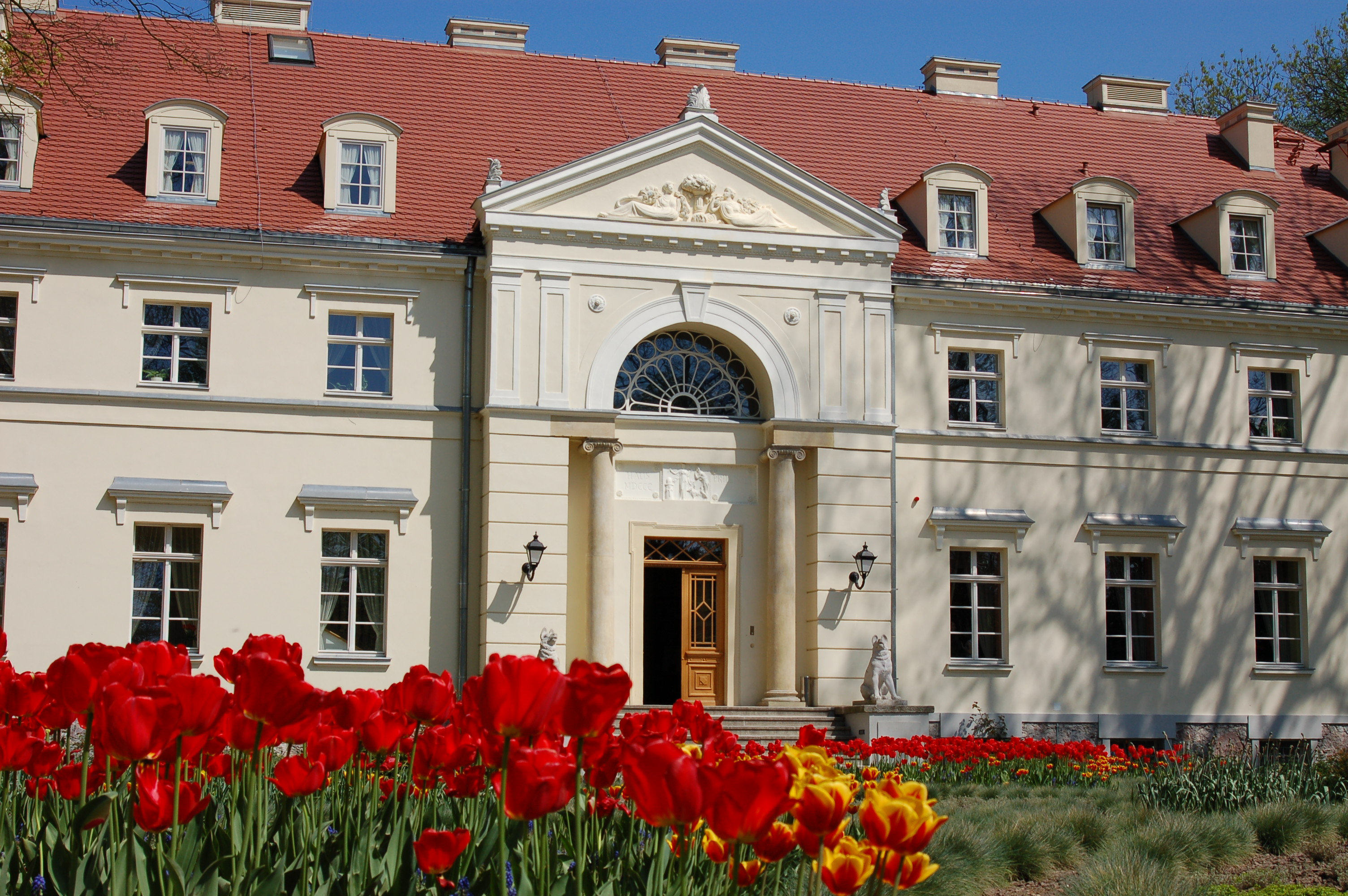 Przelewice - pałac